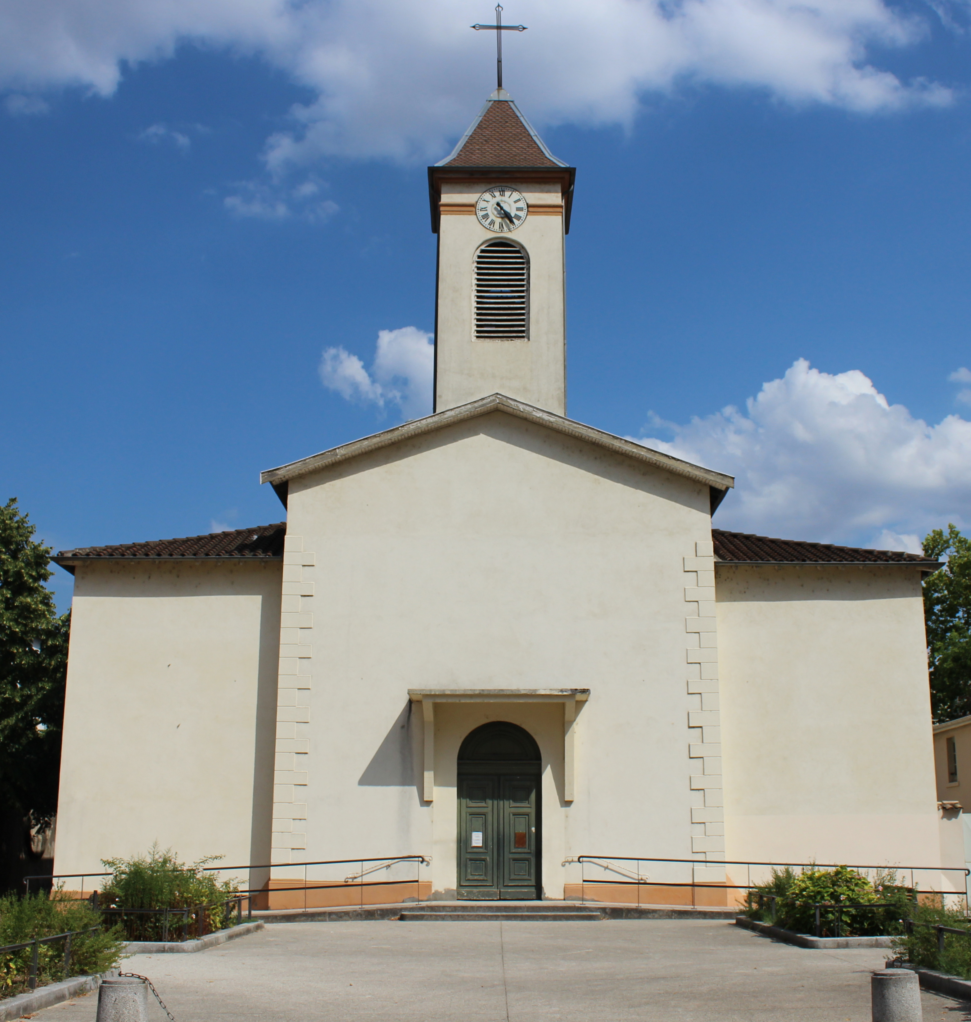 L'église Saint-Maurice, dans le 8e arrondissement de Lyon.